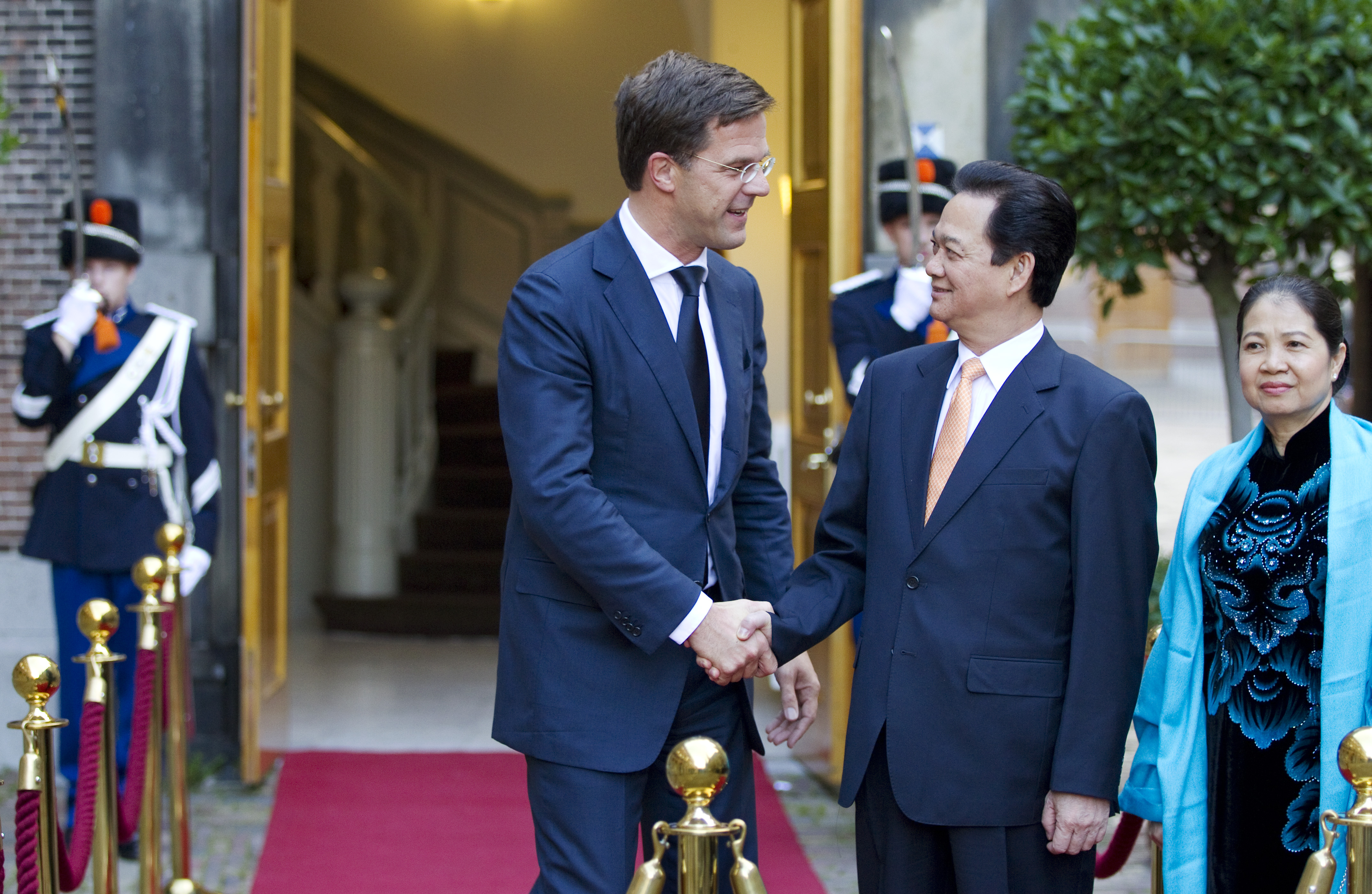 Minister-president Rutte ontvangt minister-president Nguyen Tan Dung van Vietnam op het Binnenhof. Aansluitend hebben beide ministers-presidenten een korte ontmoeting in het Torentje. Staatssecretaris Knapen van Buitenlandse Zaken is daarbij aanwezig. Tijdens deze ontmoeting zal onder meer gesproken worden over de bilaterale economische relaties en de samenwerking op het gebied van water en klimaatverandering. Lees hier meer